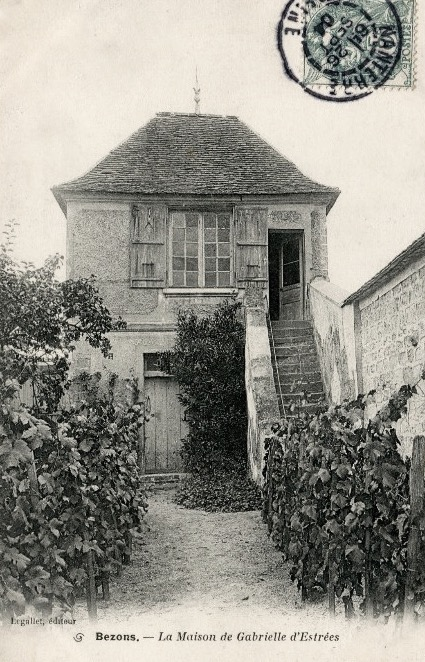 Bezons, maison de Gabrielle d'Estrées (carte postale ancienne)